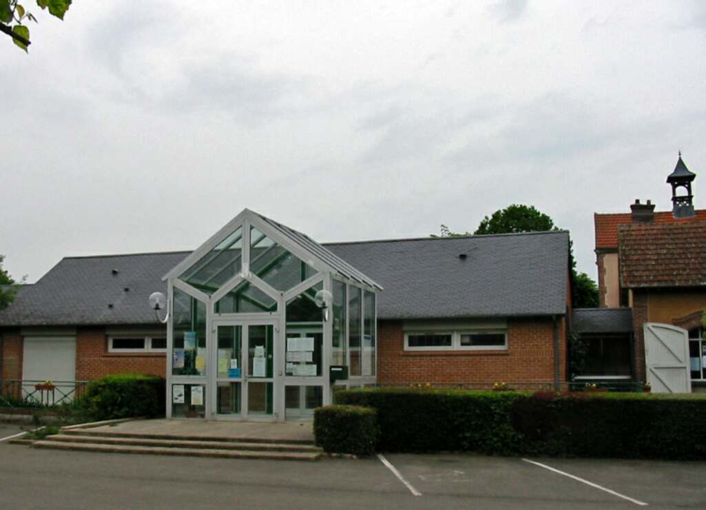 Mairie de Garnay (Eure-et-Loir)